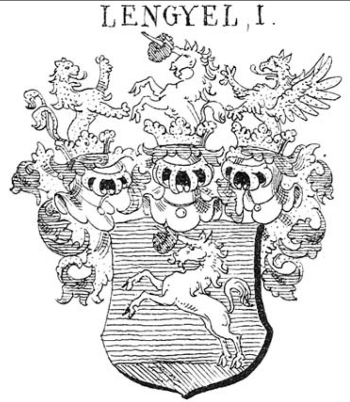 A tóti Lengyel család címere . Siebmacher féle rajz